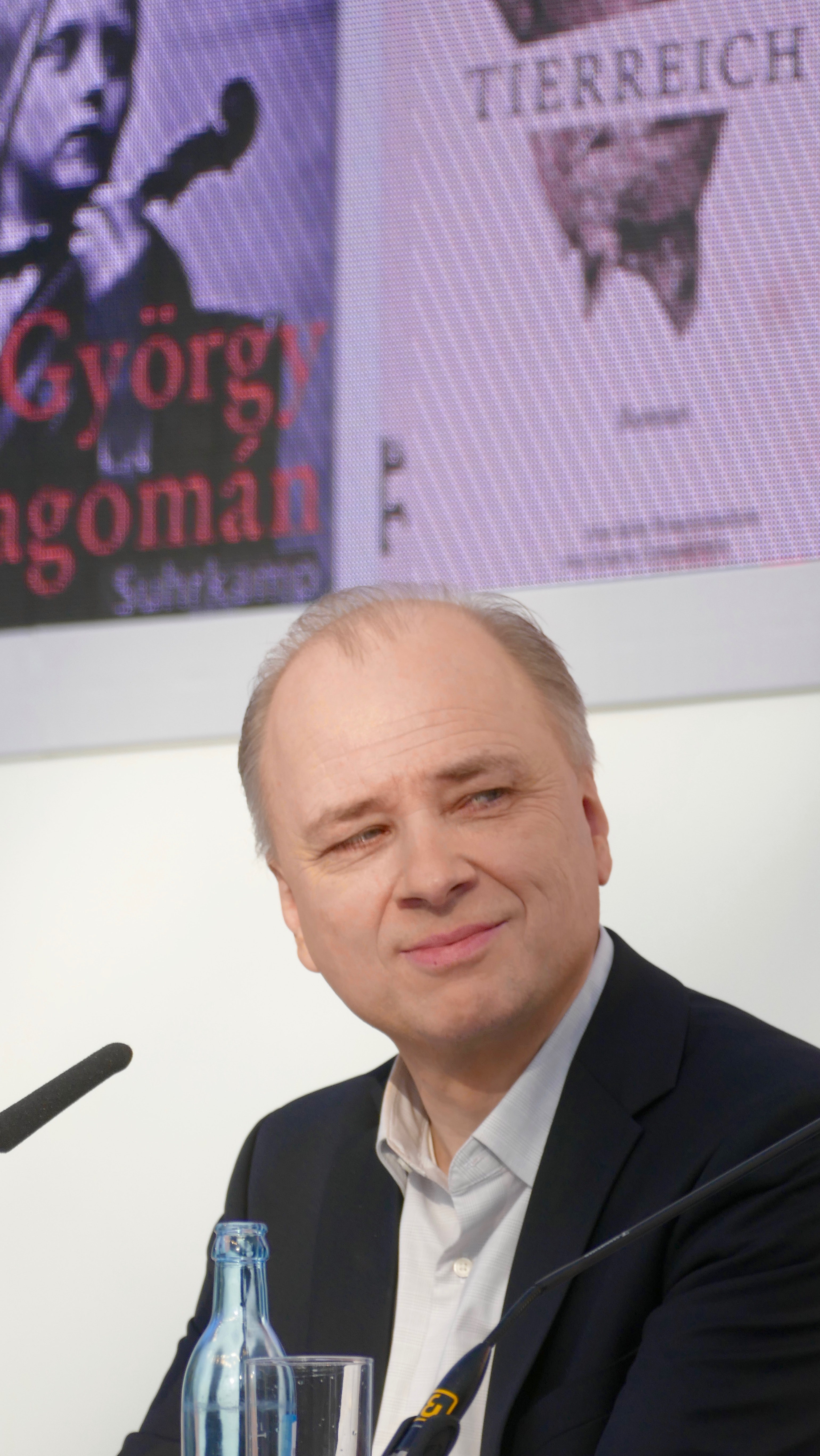 Jurymitglied beim Preis der Leipziger Buchmesse 2019: Gregor Dotzauer (Tagesspiegel)